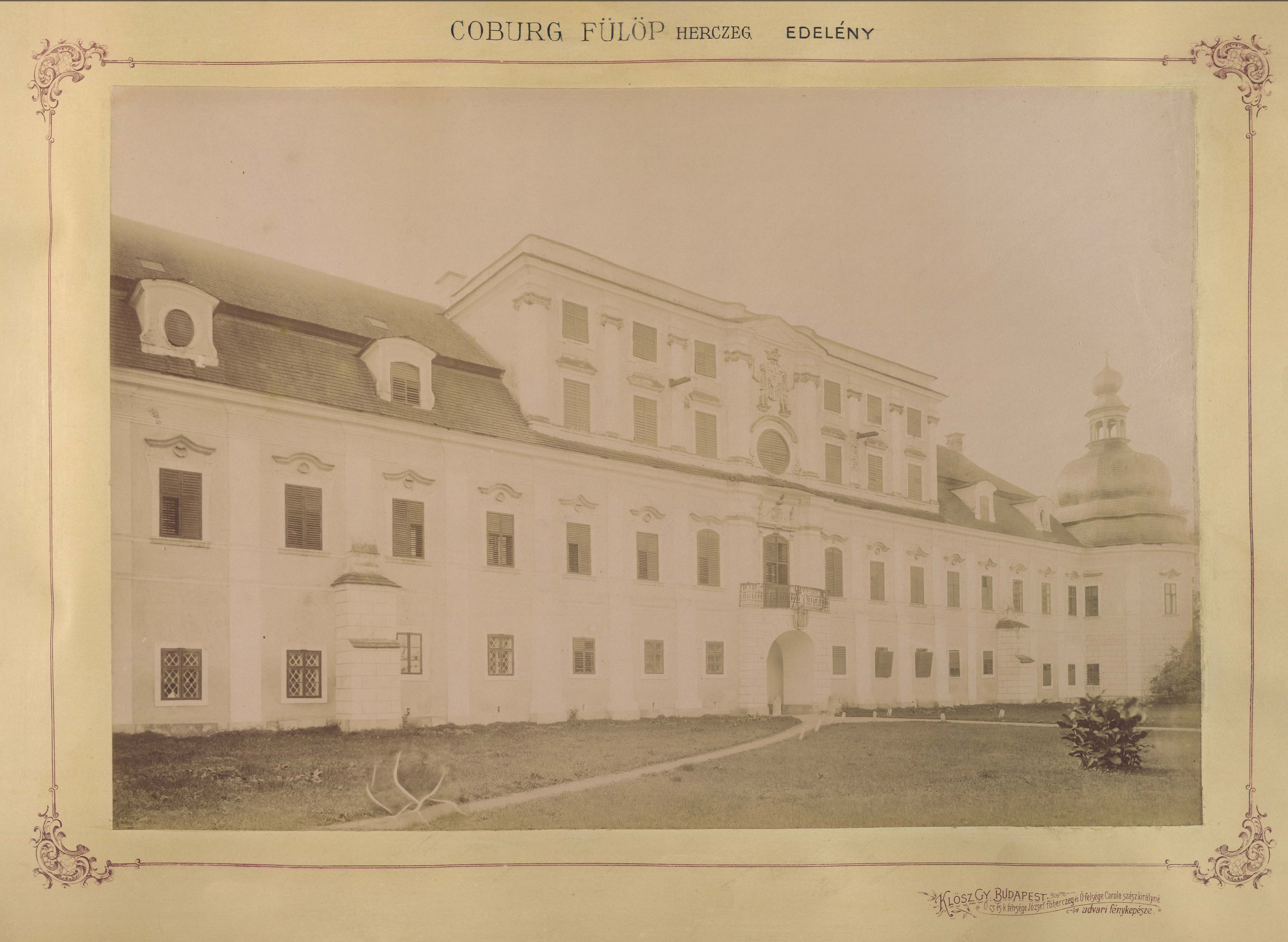 L'Huillier-Coburg kastély. A felvétel 1895-1899 között készült. A kép forrását kérjük így adja meg: Fortepan / Budapest Főváros Levéltára. Levéltári jelzet: HU.BFL.XV.19.d.1.12.062 Location: Hungary, Edelény Title: L'Huillier-Coburg kastély. A felvétel 1895-1899 között készült. A kép forrását kérjük így adja meg: Fortepan / Budapest Főváros Levéltára. Levéltári jelzet: HU.BFL.XV.19.d.1.12.062